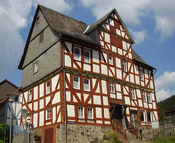 Schenkbarsches Haus Biedenkopf, eigenes Bild